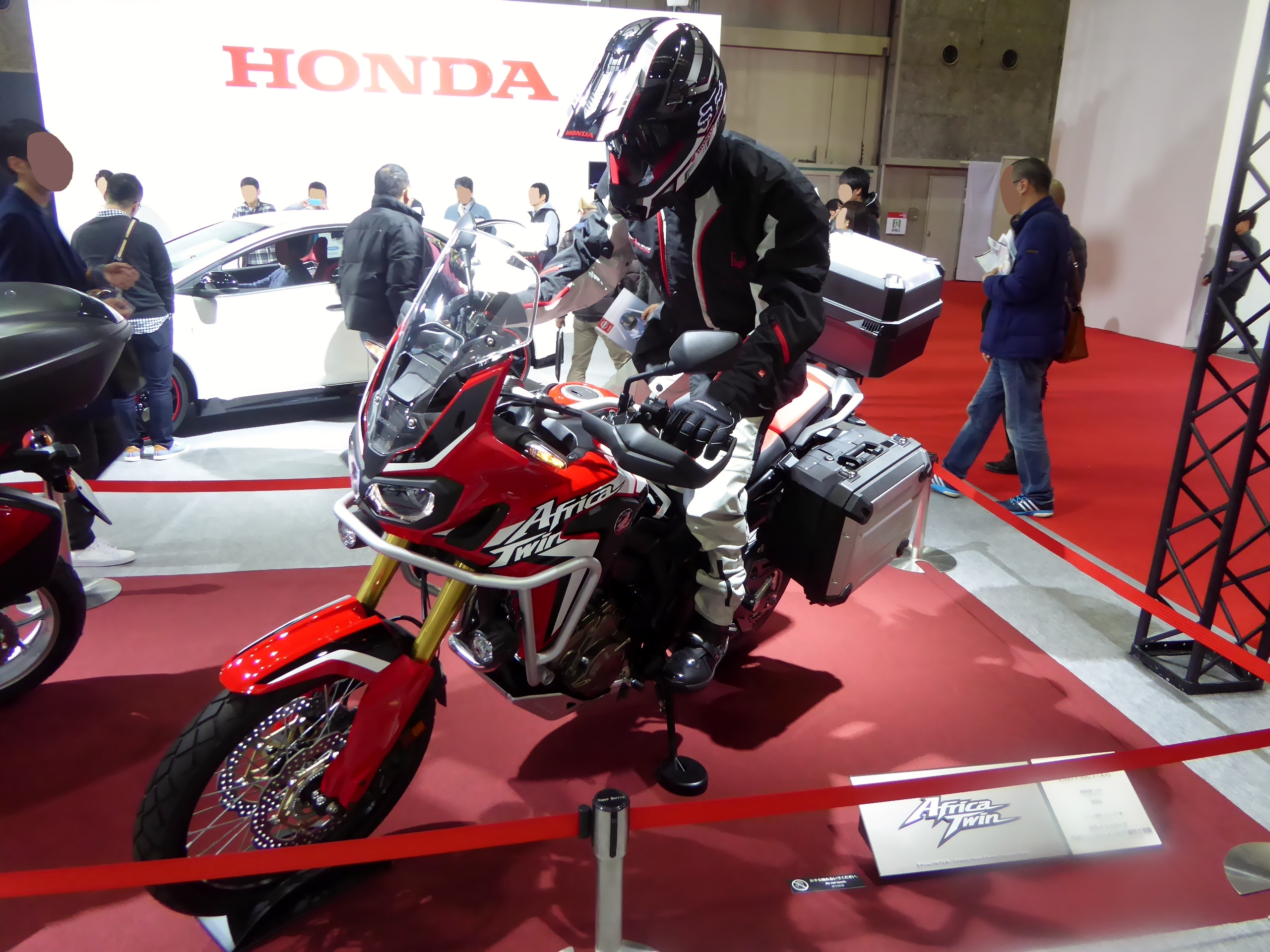 大阪モーターショー2015においてホンダ・CRF1000Lアフリカツインを撮影。